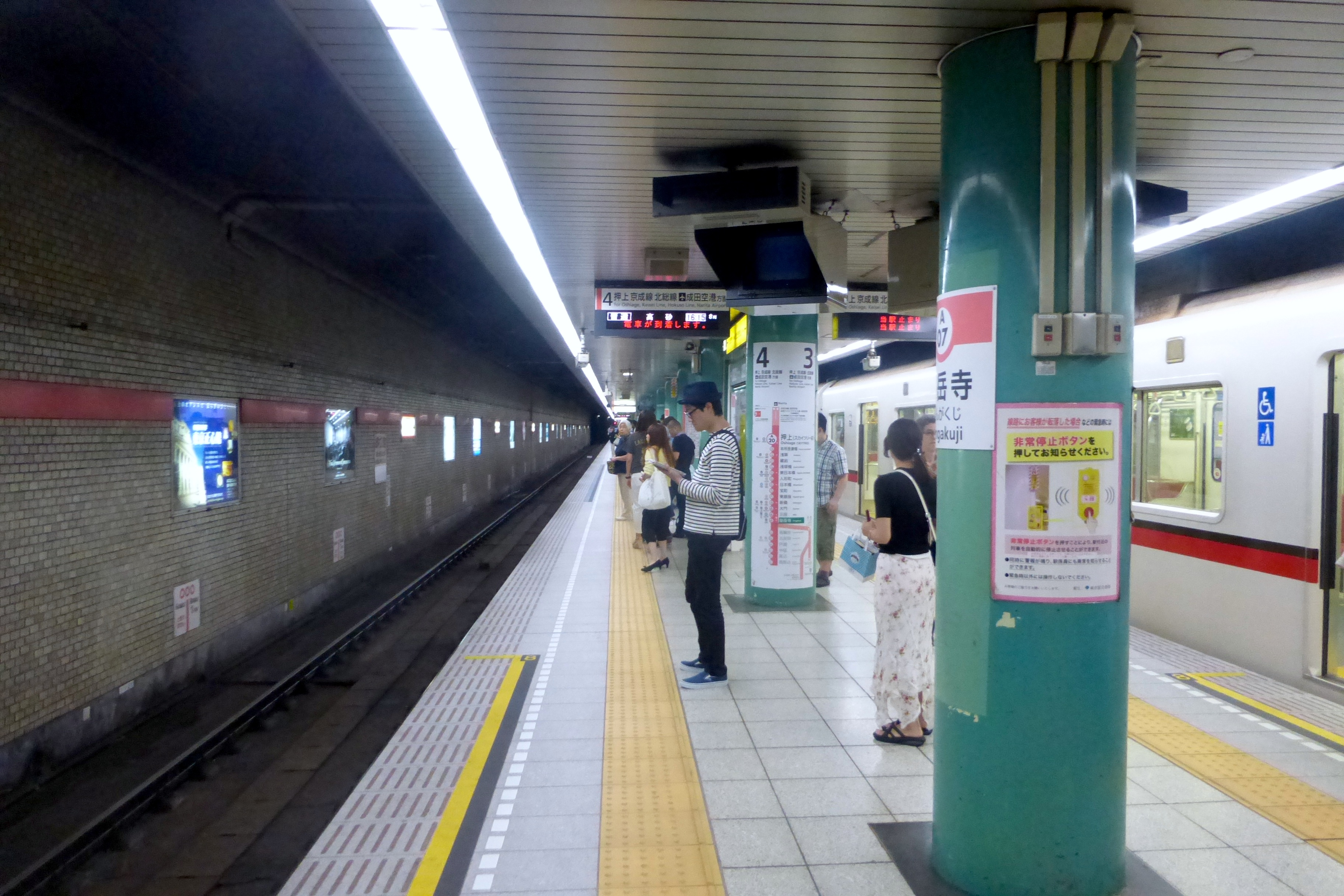 Asakusa line, Sengakuji Station platform (浅草線, 泉岳寺駅のホーム)